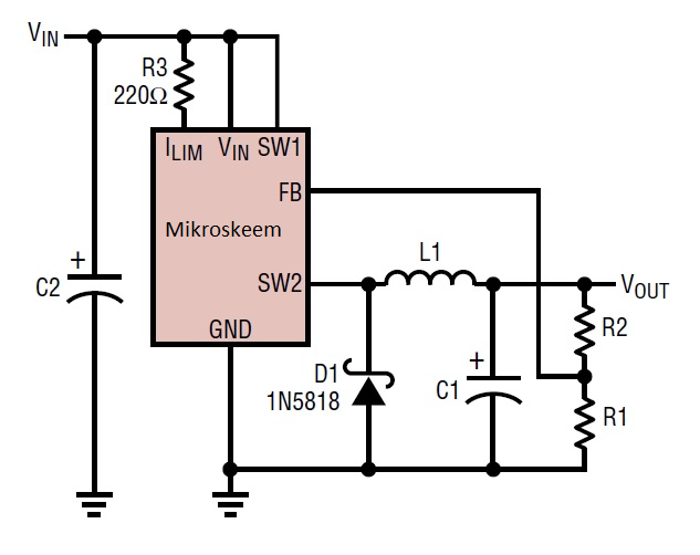 Pinget madaldav muundur mikroskeemi baasil